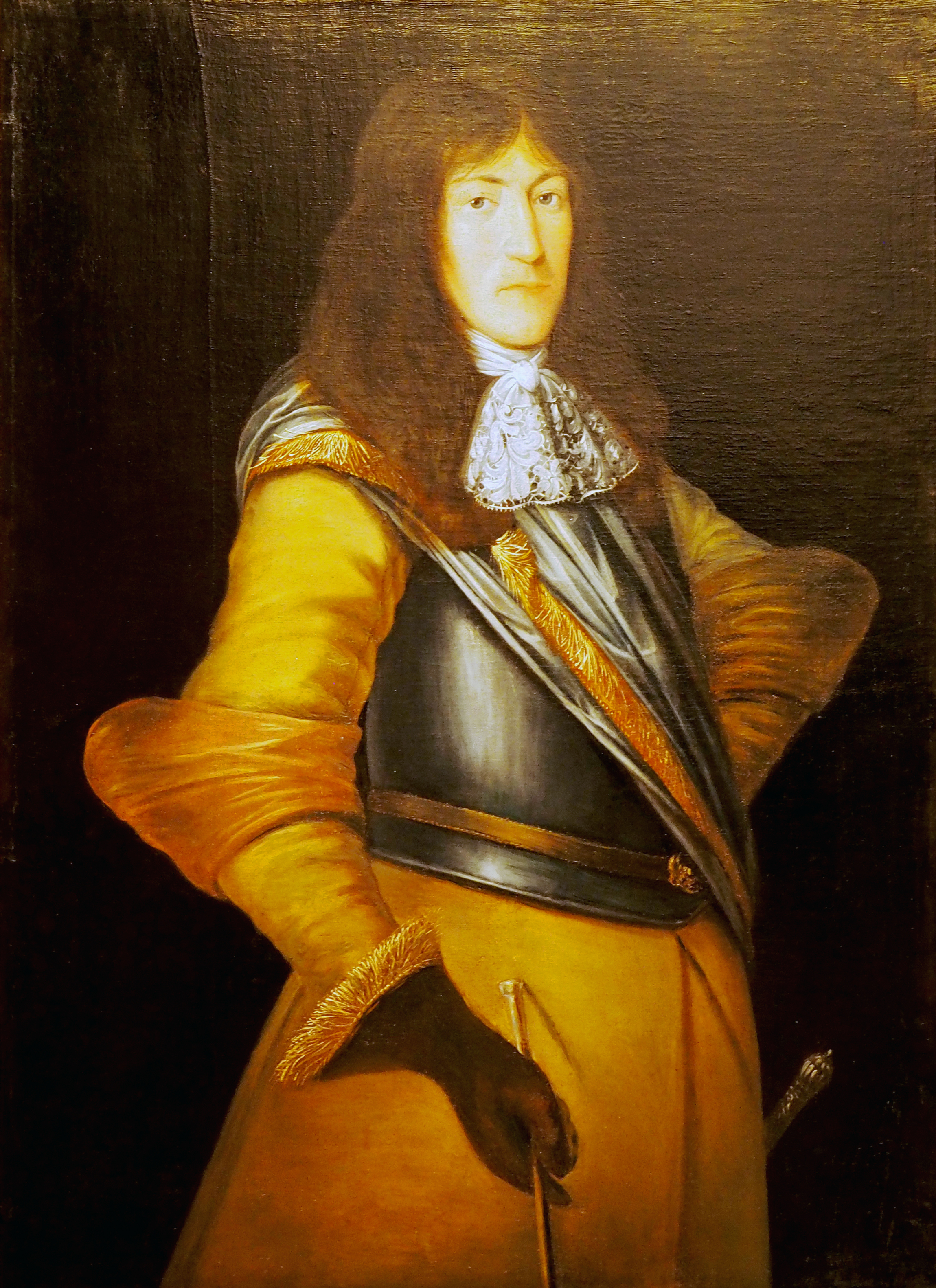 Georg Ernst von Melvill (1668-1742), 1678 Page am Hof des Herzogs Georg Wilhelm von Braunschweig-Lüneburg, 1685 Offizier des Celler Infanterie-Regiments La Motte, 1728 Generalleutnant und Gouverneur der Festung Hameln, 1733 Kommandant der Residenz Hannover, 1735 General der Infanterie